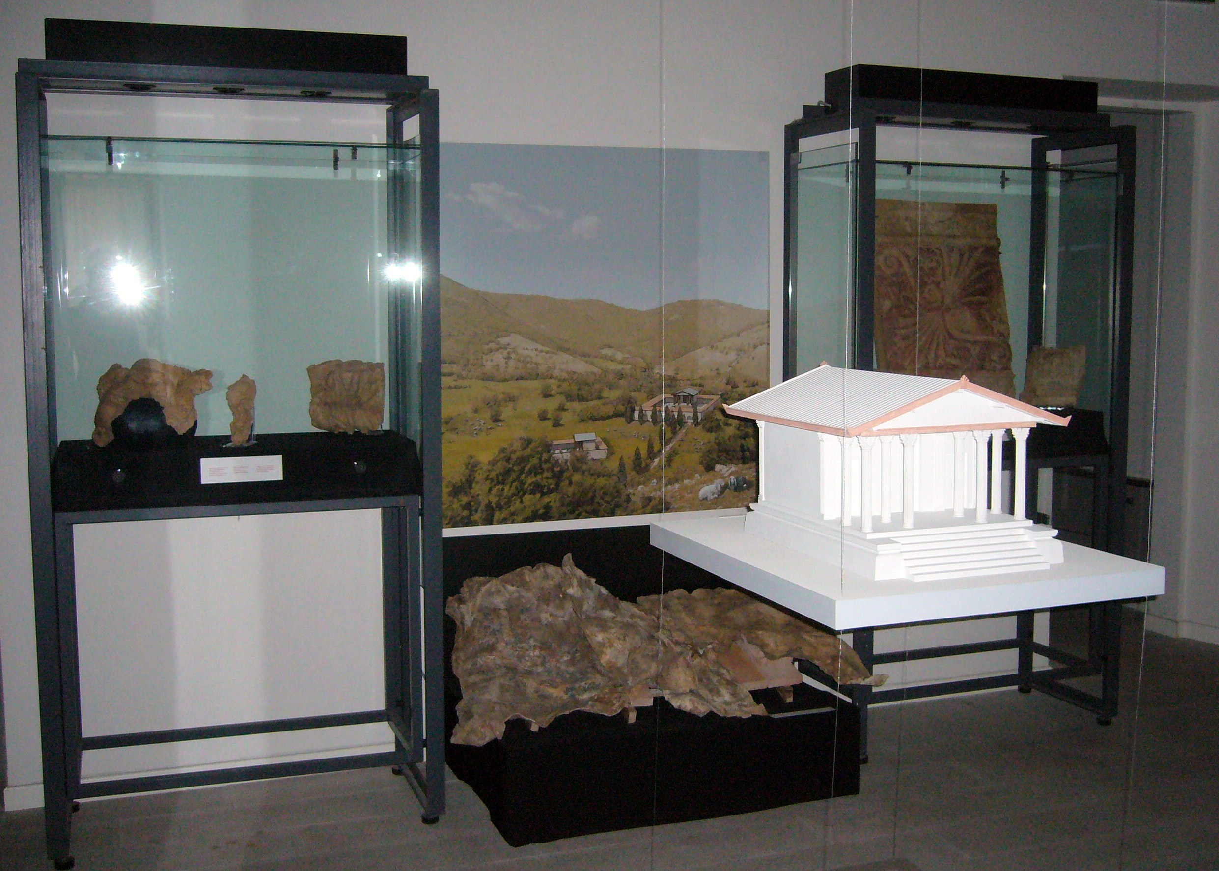 particolare della sezione archeologica in Palazzo Santi a Cascia sede del Museo civico